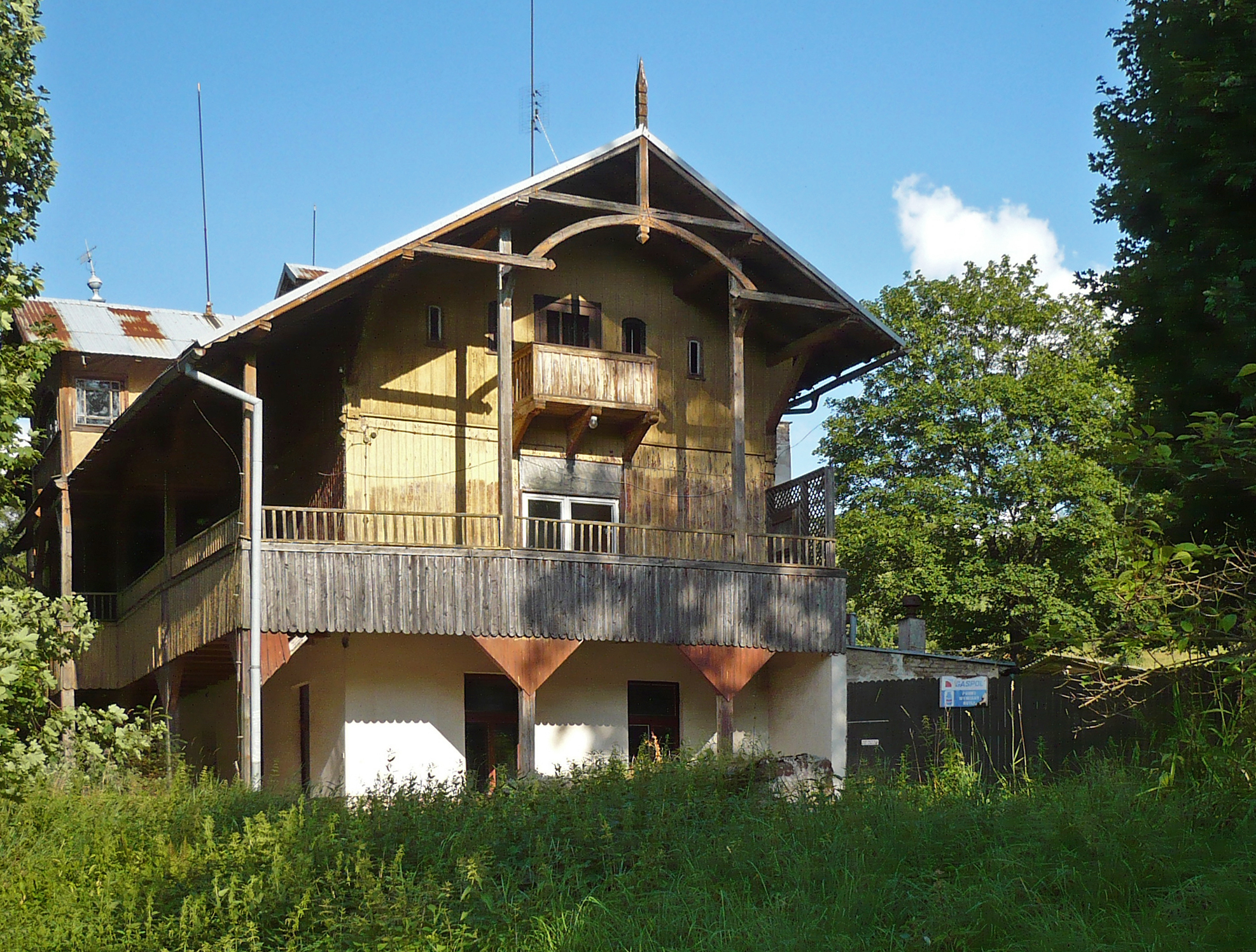 Nowa Ruda, schronisko na Górze św. Anny